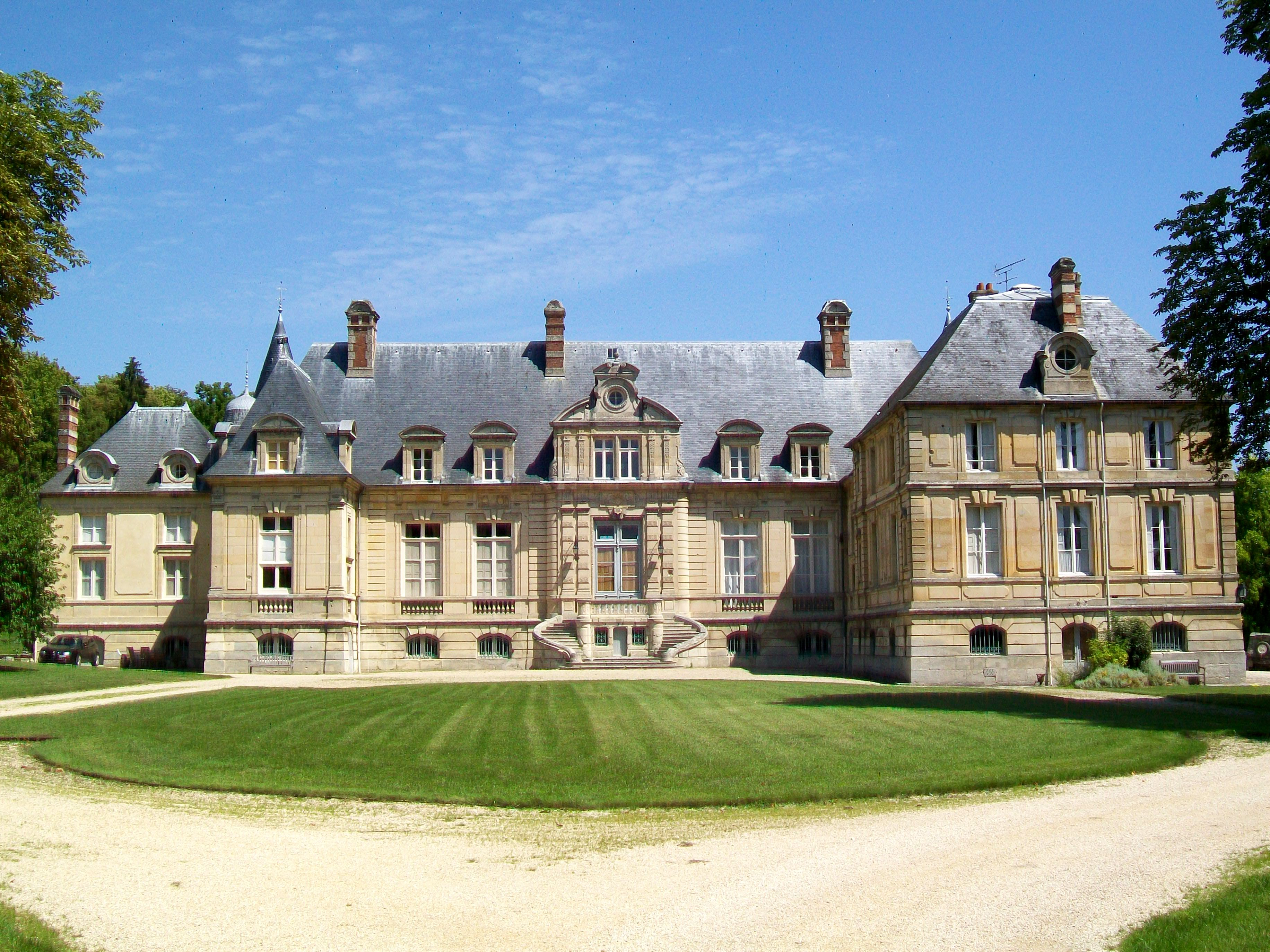 Le château de Boran-sur-Oise, rue du Château.